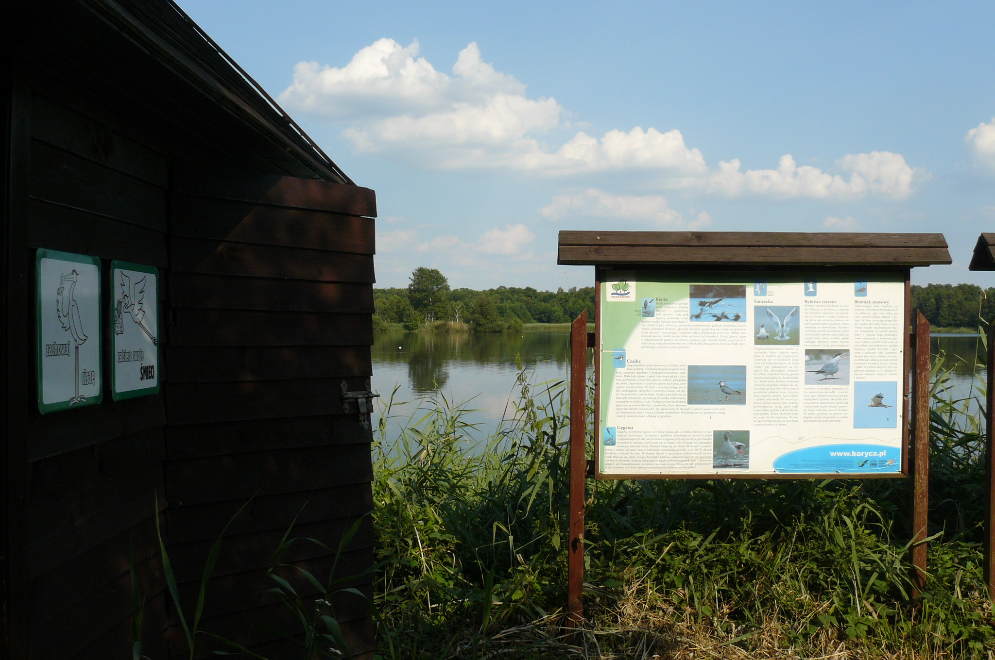 Stawy Milickie - staw Niezgoda w Niezgodzie. Czatownia dla miłośników ptactwa.